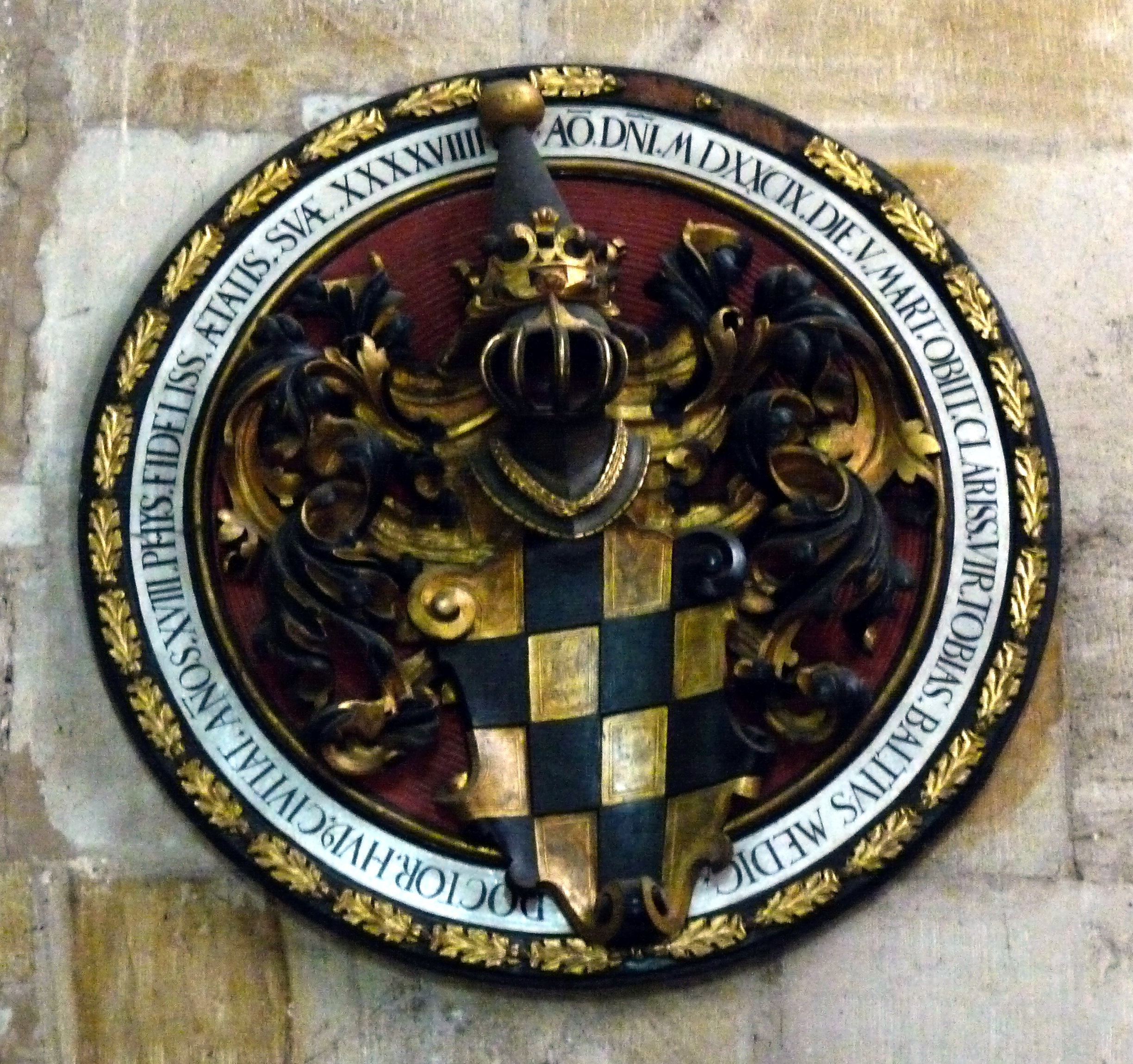 Esslingen - Frauenkirche - Totenschild Tobias Baltius